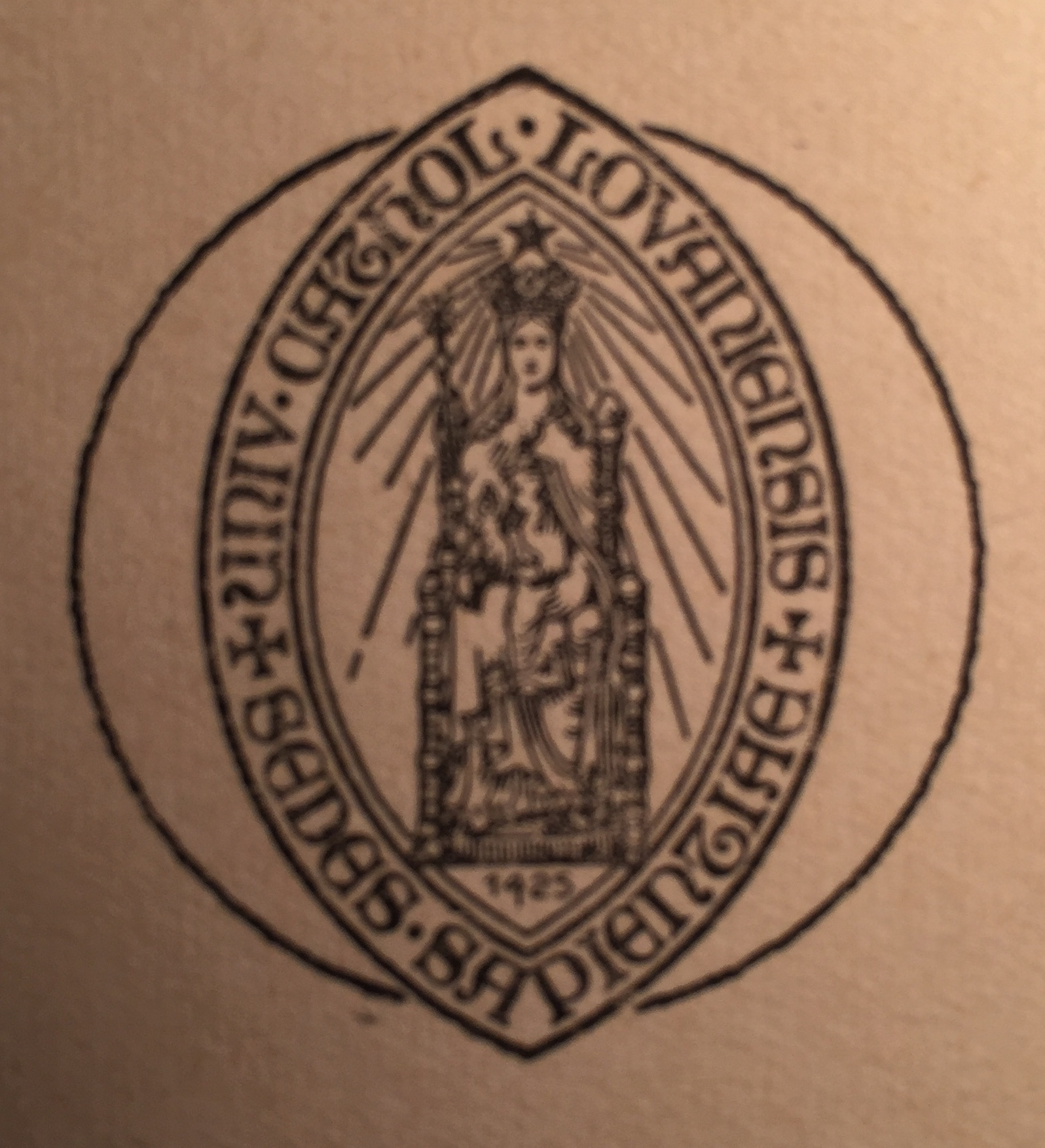 Sceau de l'Université catholique de Louvain, 1909